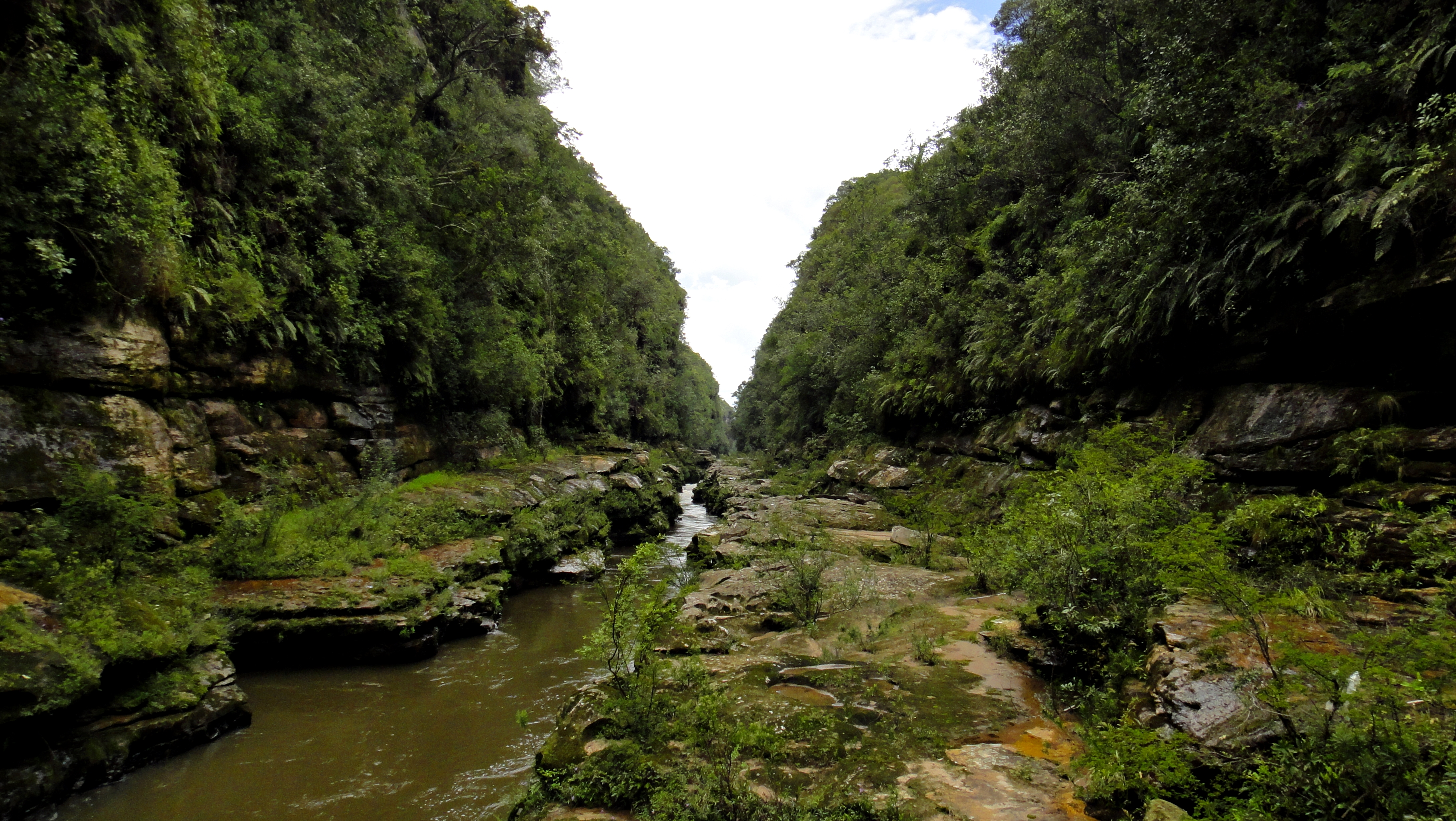 Trecho do cânion do rio Jaguariaíva, chamado de Encanadão, na borda Leste do Parque Estadual do Cerrado. Acessado somente por atividade de rafting, muito divertida.